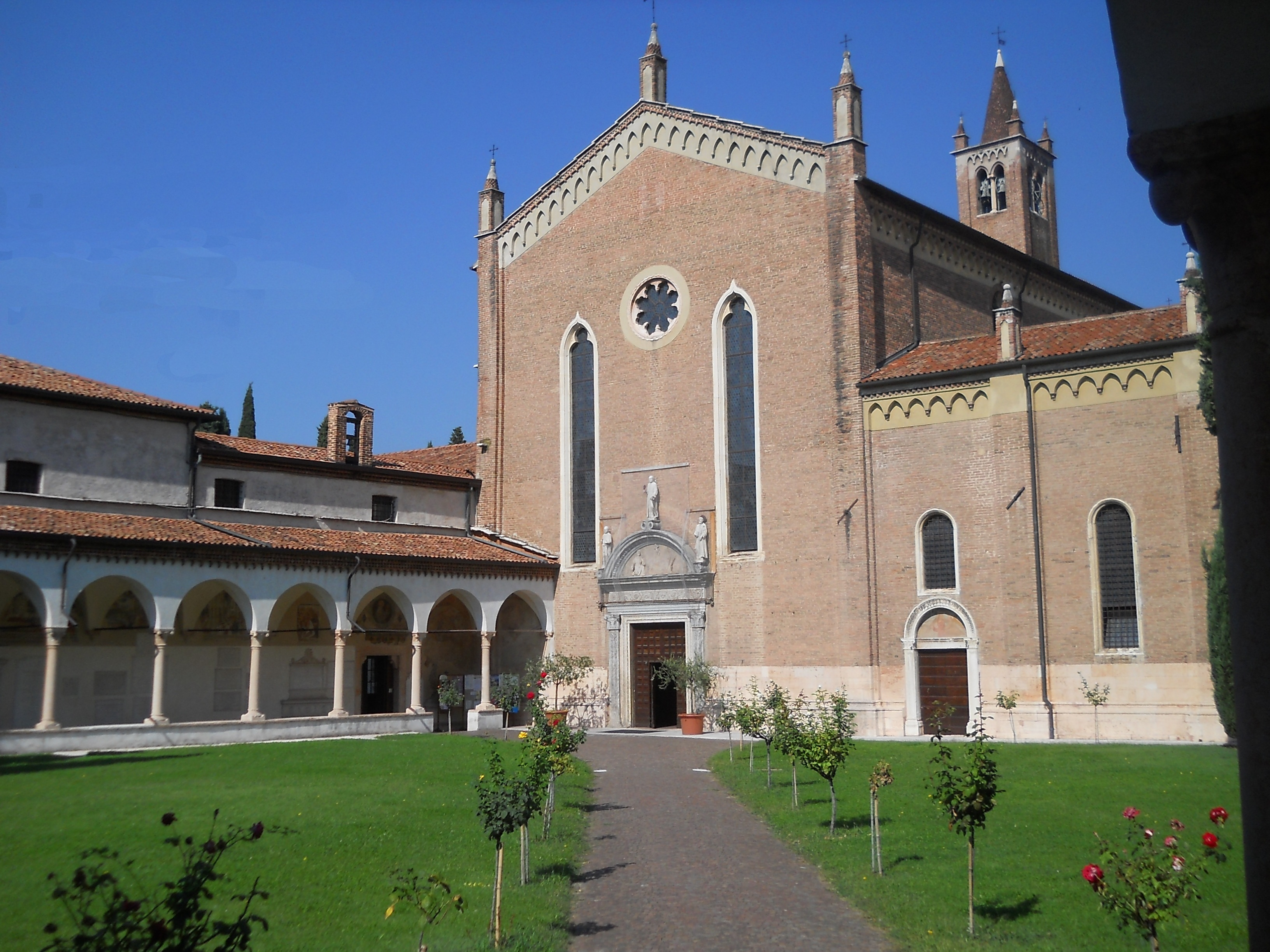 Esterno della chiesa di San Bernardino a Verona